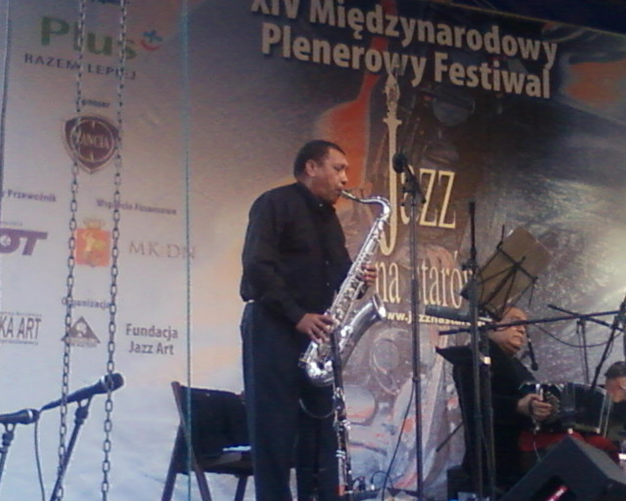 Felix Saluzii na XIV Międzynarodowym Plenerowym Festiwalu Jazz Na Starówce 2008